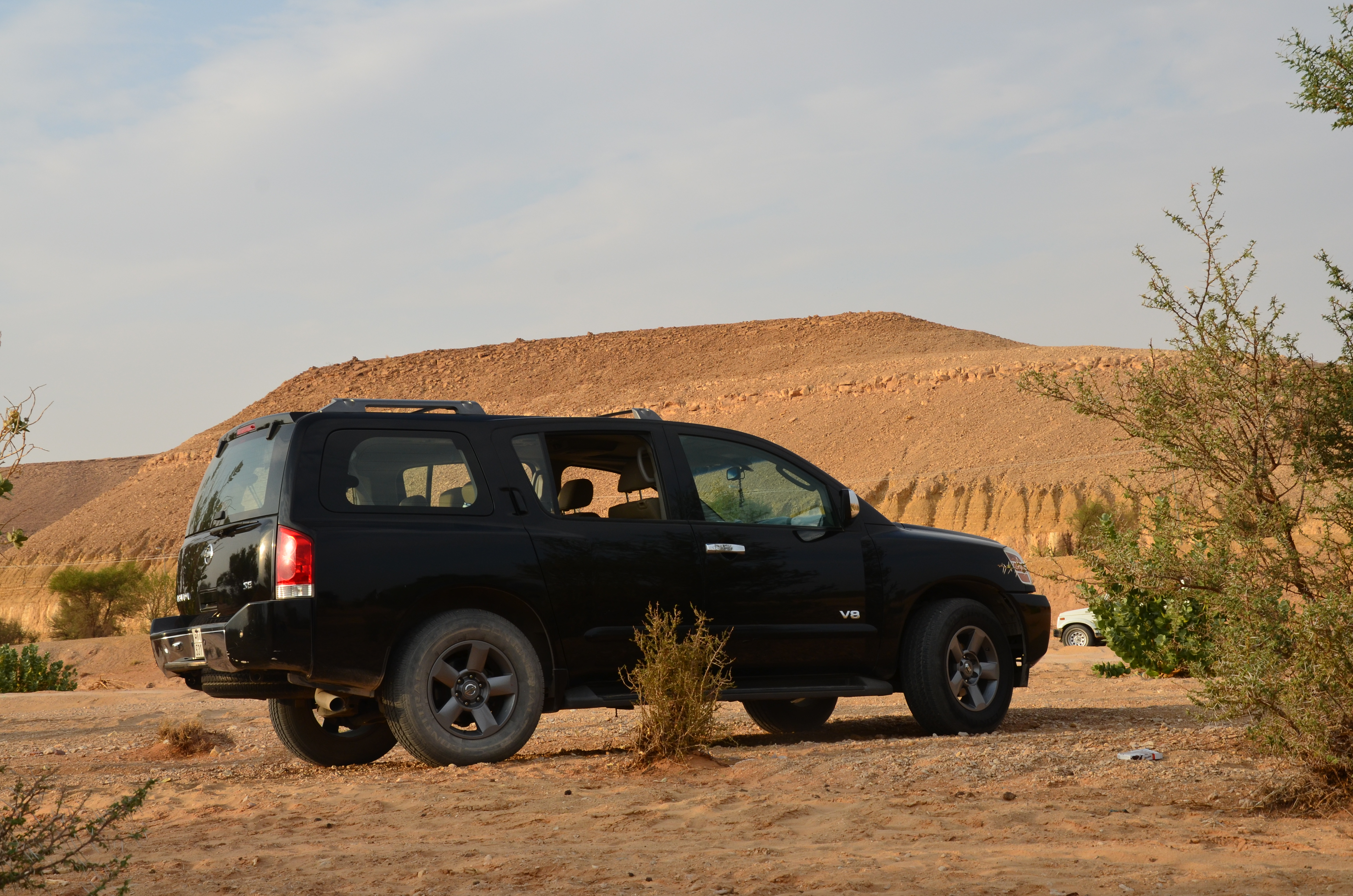 جيب أرمادا نيسان 2006 بلدة العيينة الرياض المملكة العربية السعودية